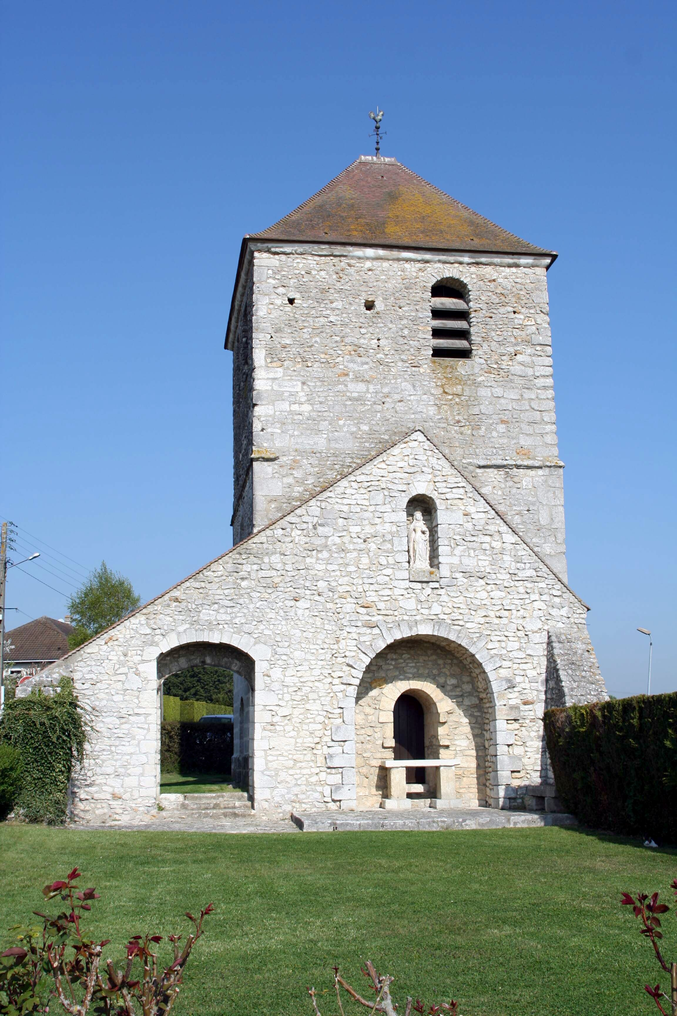 Église de Neauphlette - Yvelines (France)